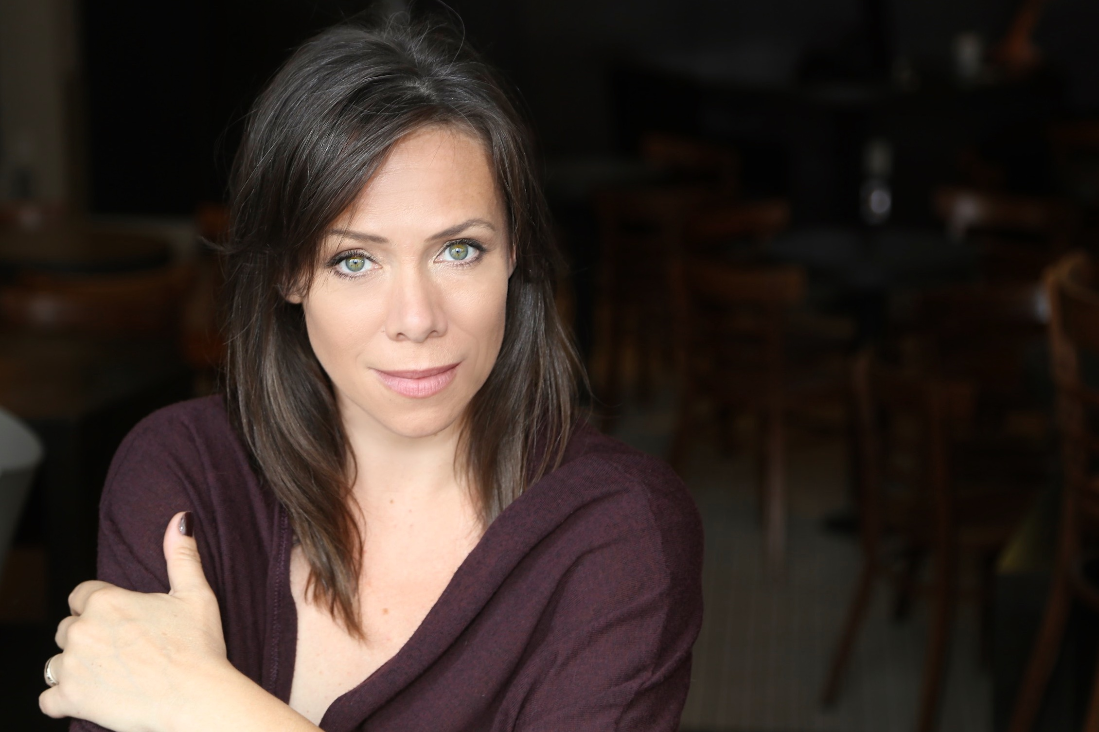 Fabiola Toupin (Octobre 2017)